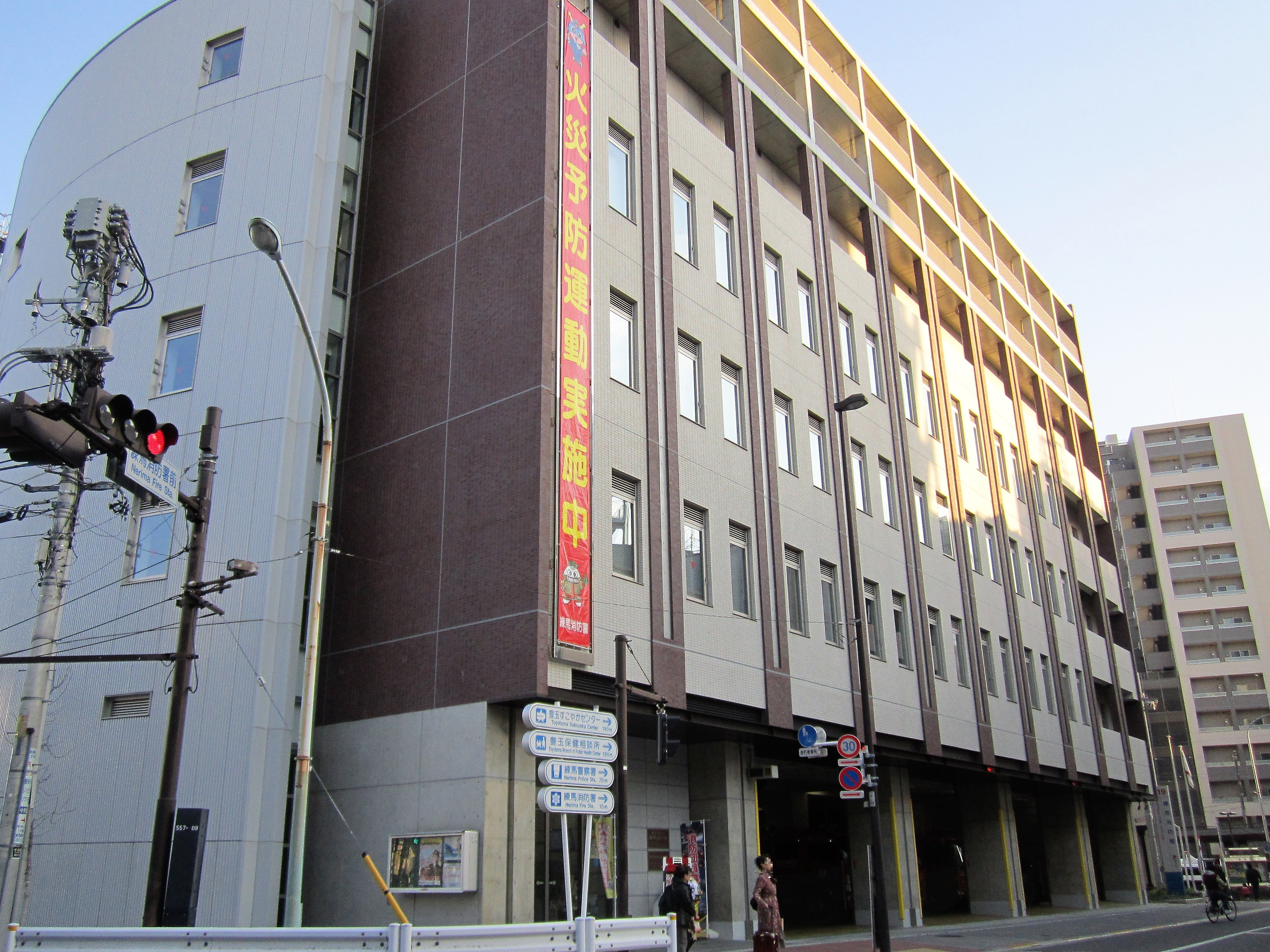 練馬消防署（新庁舎） Canon PowerShot A2200